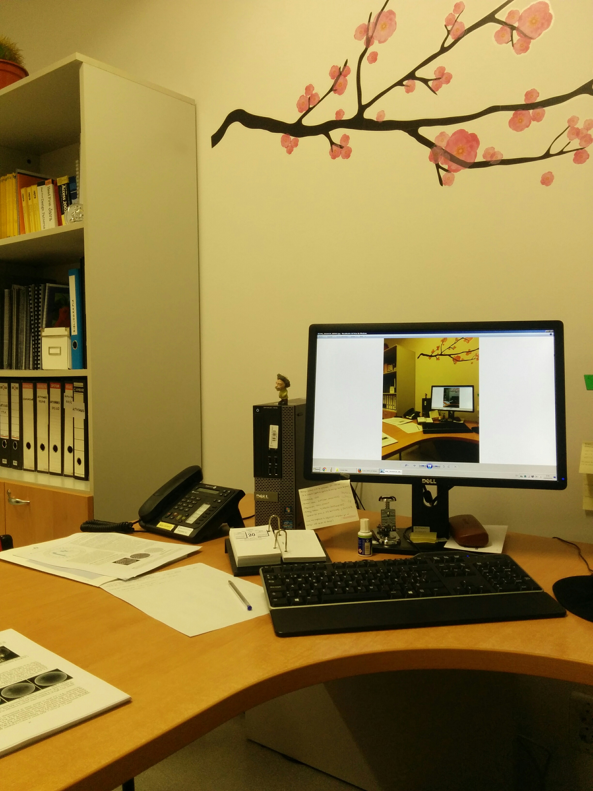 Imagen original